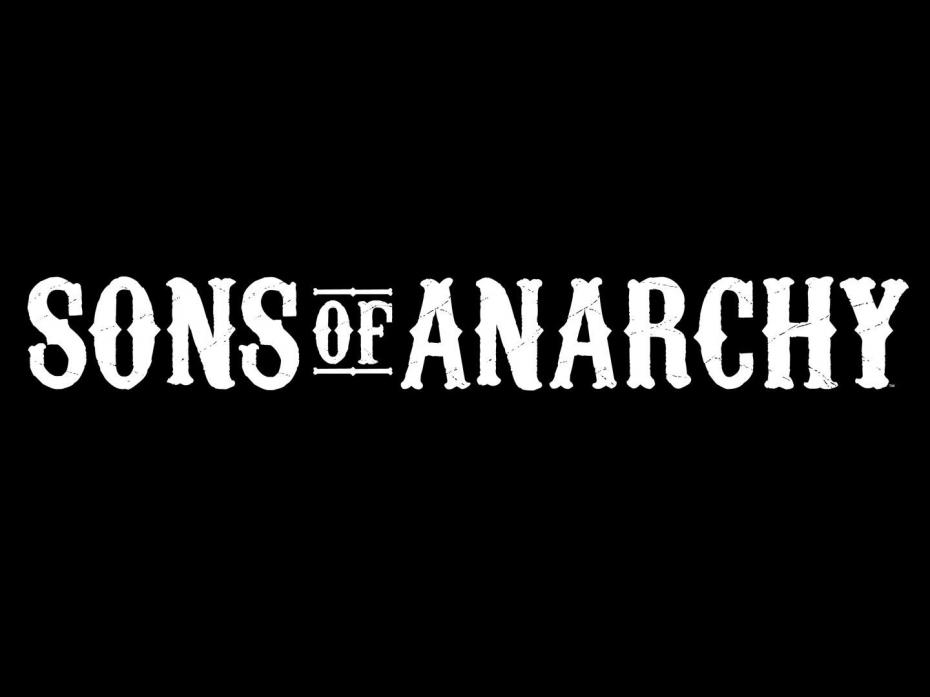 Diese Grafik zeigt das Logo der TV Serie Sons of Anarchy